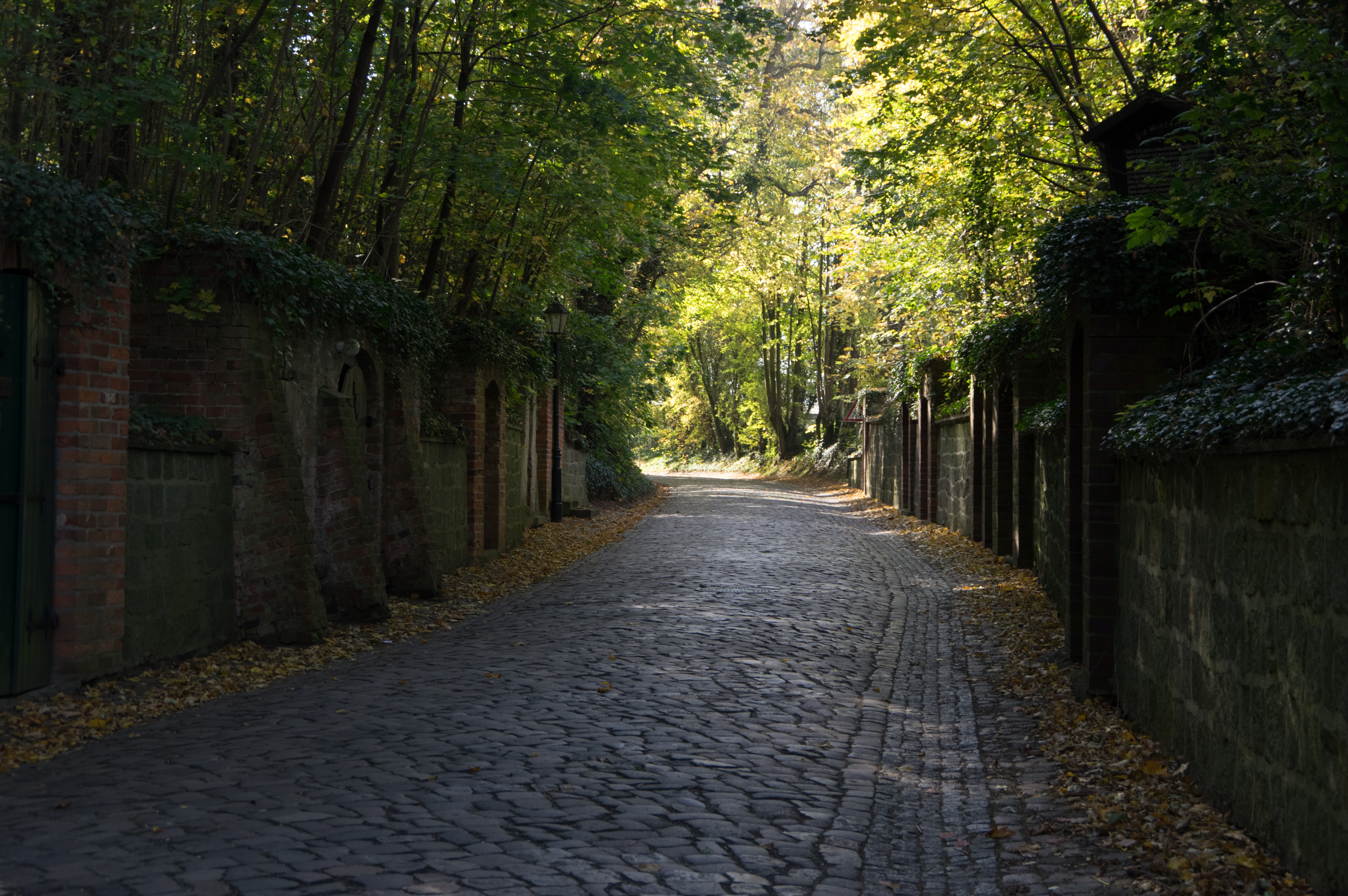 Schlieben in Brandenburg. Die Bergkeller sind denkmalgeschützt.